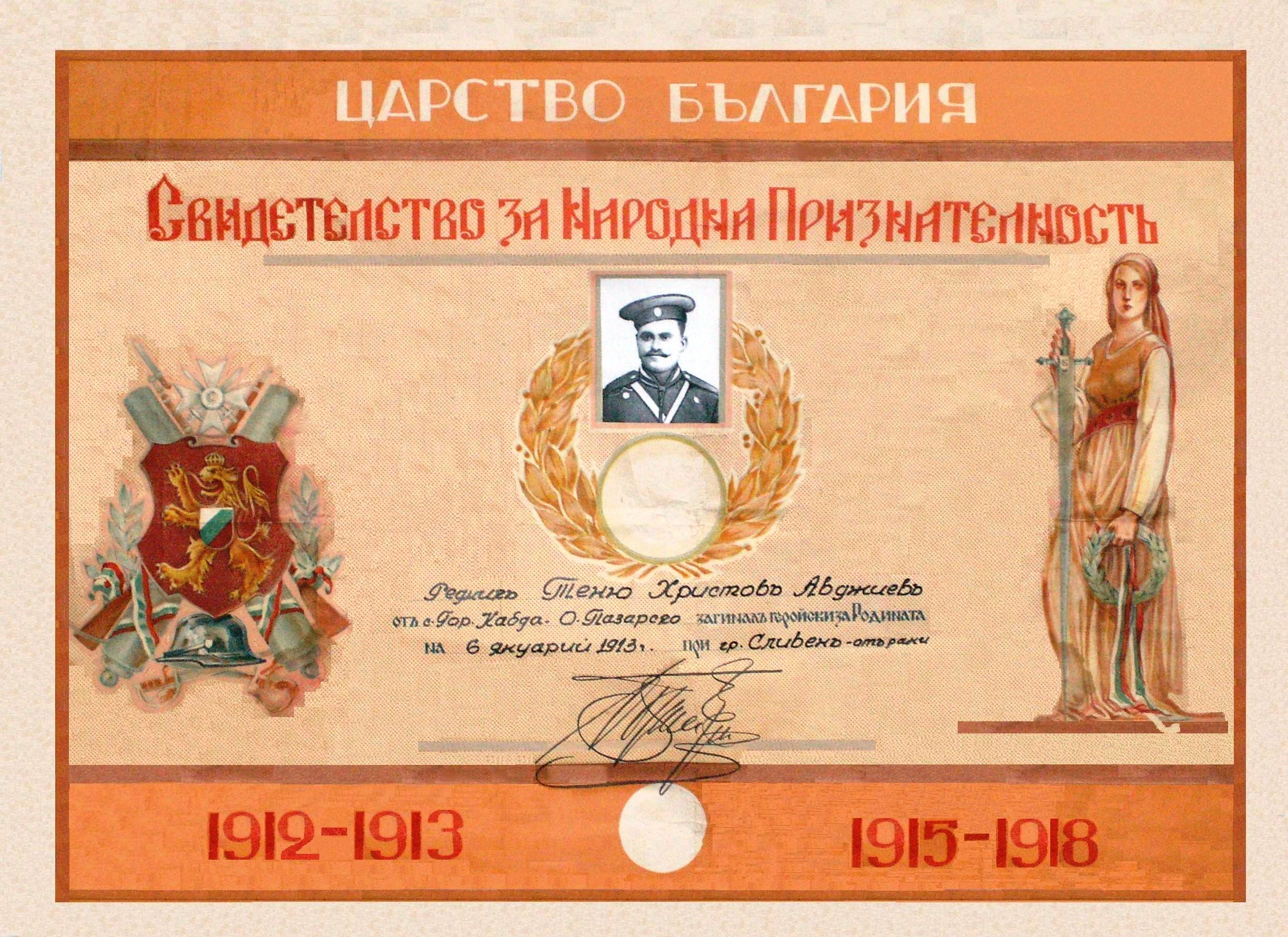 Теню Христов Авджиев (1876-1913) - жител на с. Горна Кабда (Поповско), преселник от село Конак (Поповско). Загинал в Балканската война като артилерист.